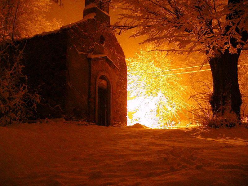 Kaplička v Uhelné - zima 2002